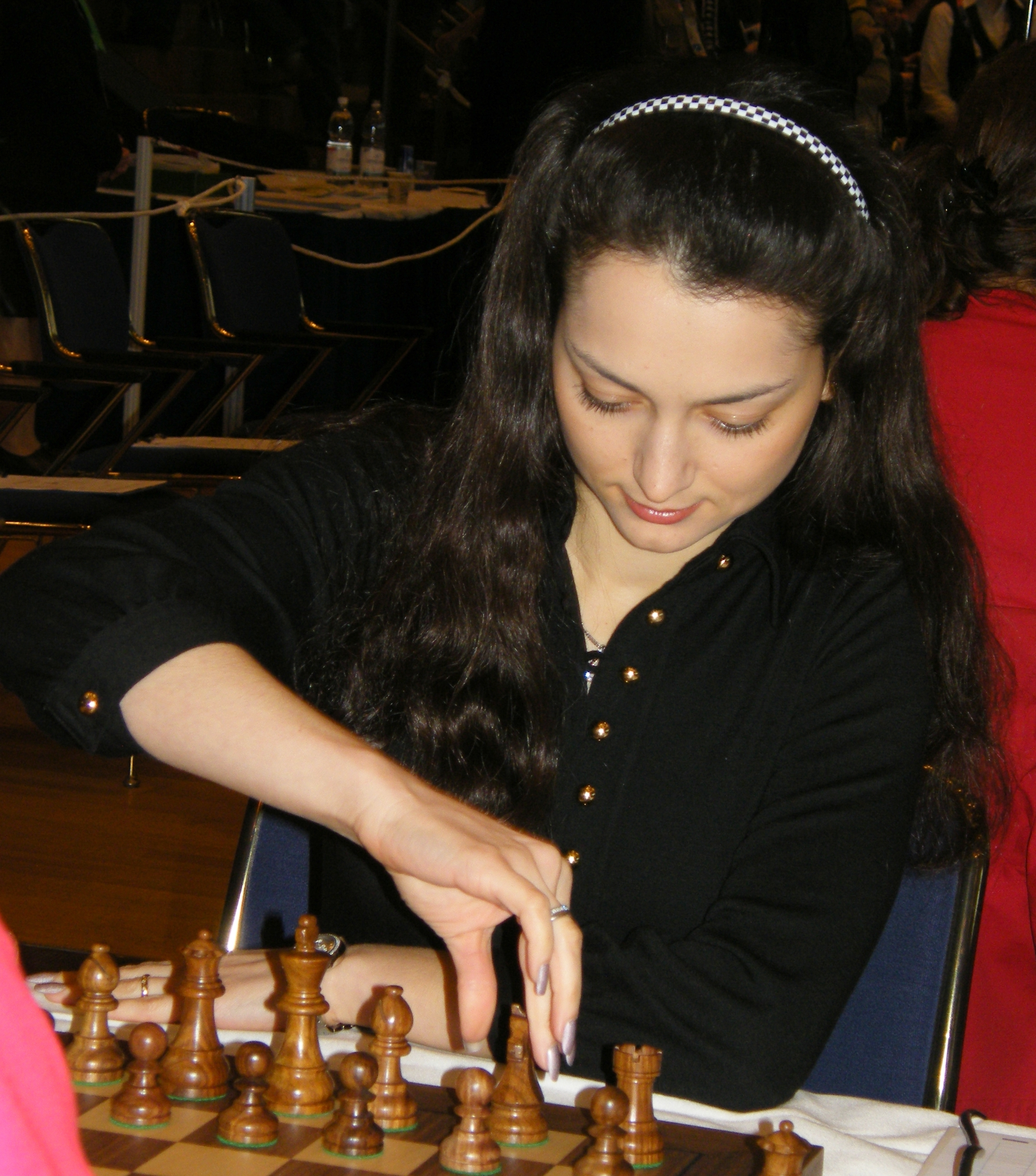 Alexandra Kostenjuk bei der 38. Schacholympiade in Dresden 2008